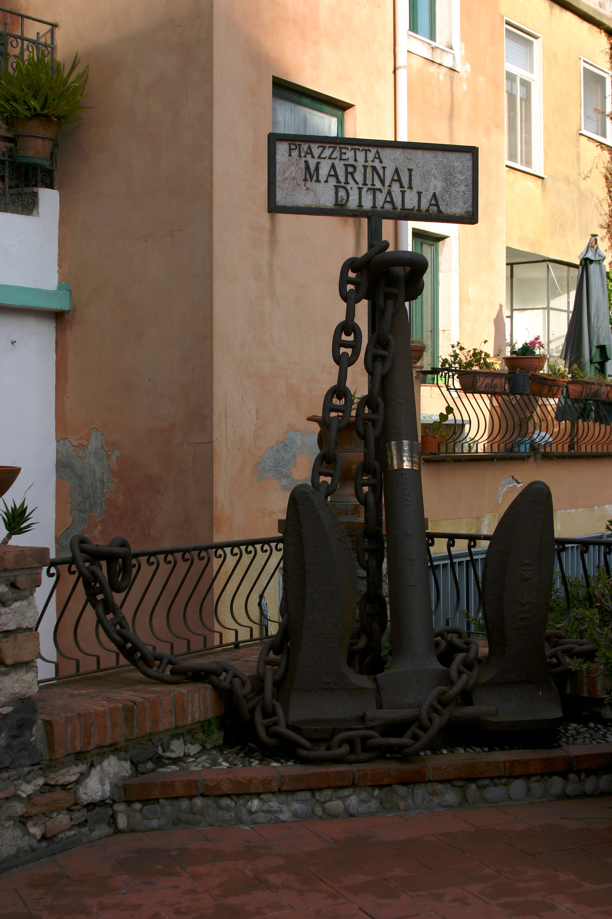 Piazzeta Marinai D'Italia - Taormina